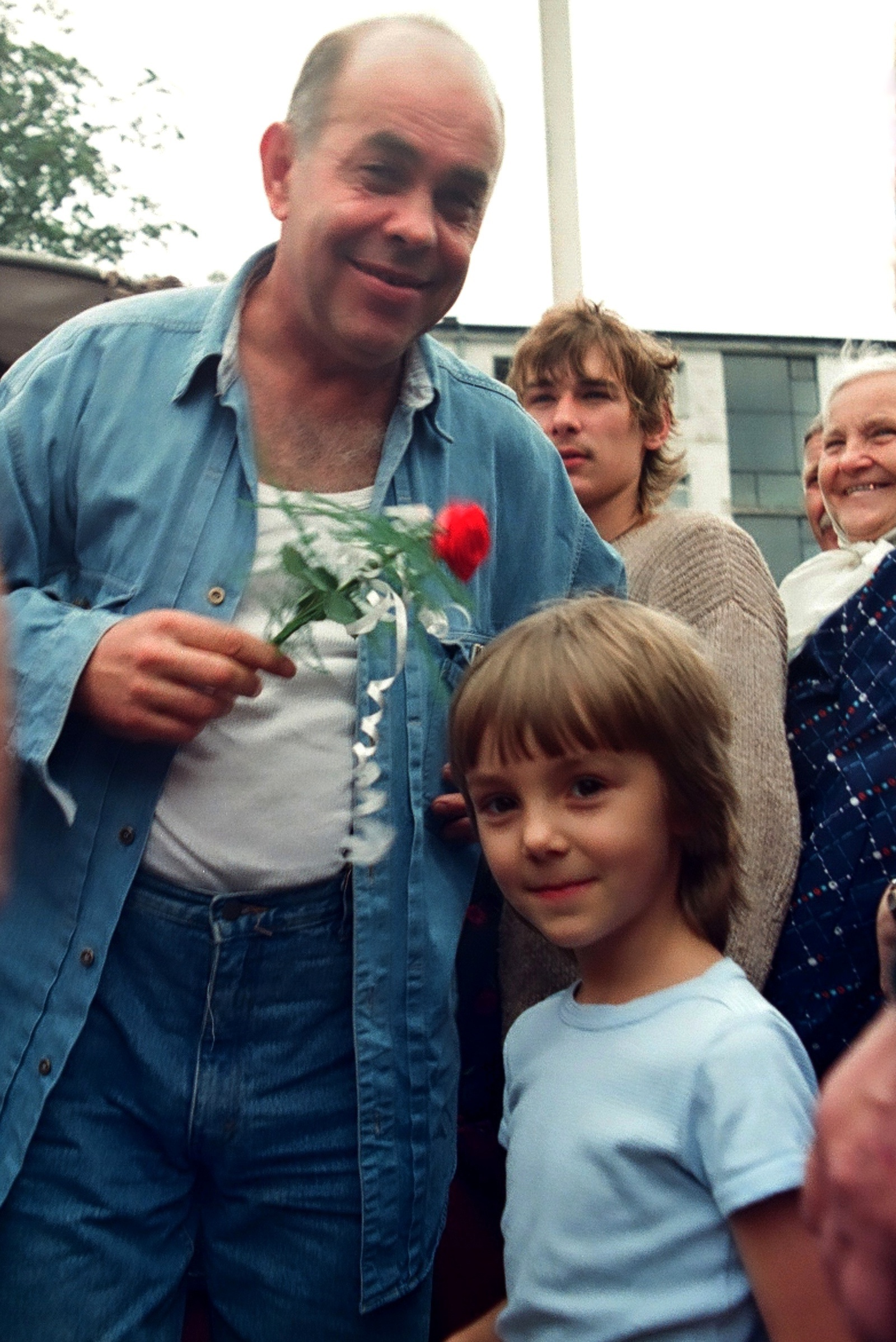 Jacek Kuroń na spotkaniu z mieszkańcami Gorzowa Wlkp. Po spotkaniu serwował "kuroniówkę" (Stary Rynek-10.08.1991)